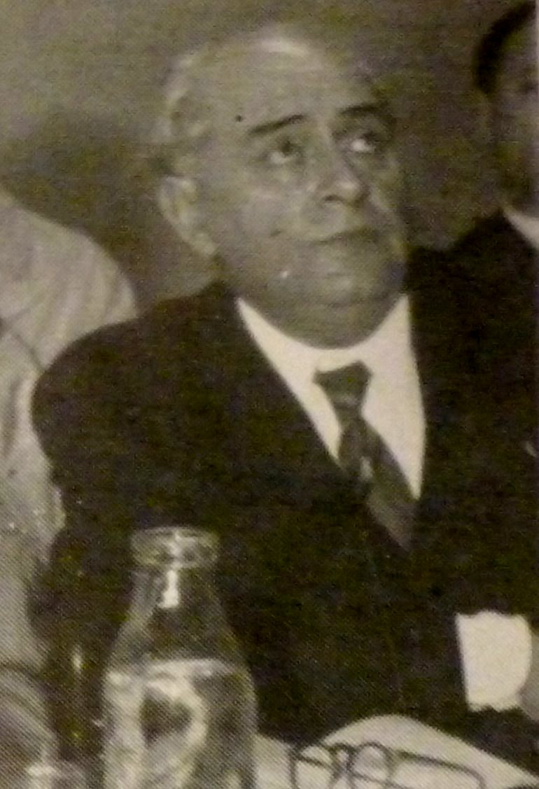 Sebastián Marotta en 1943, dirigente sindical argentino, durante una asamblea de personal en La Estampa.